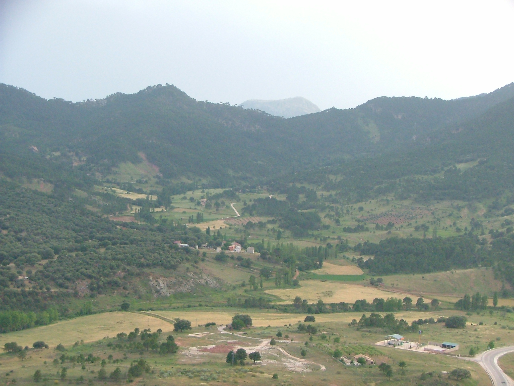 Cumbre del Padroncillo (desde lo alto de Riópar-Sierra de Alcaraz)